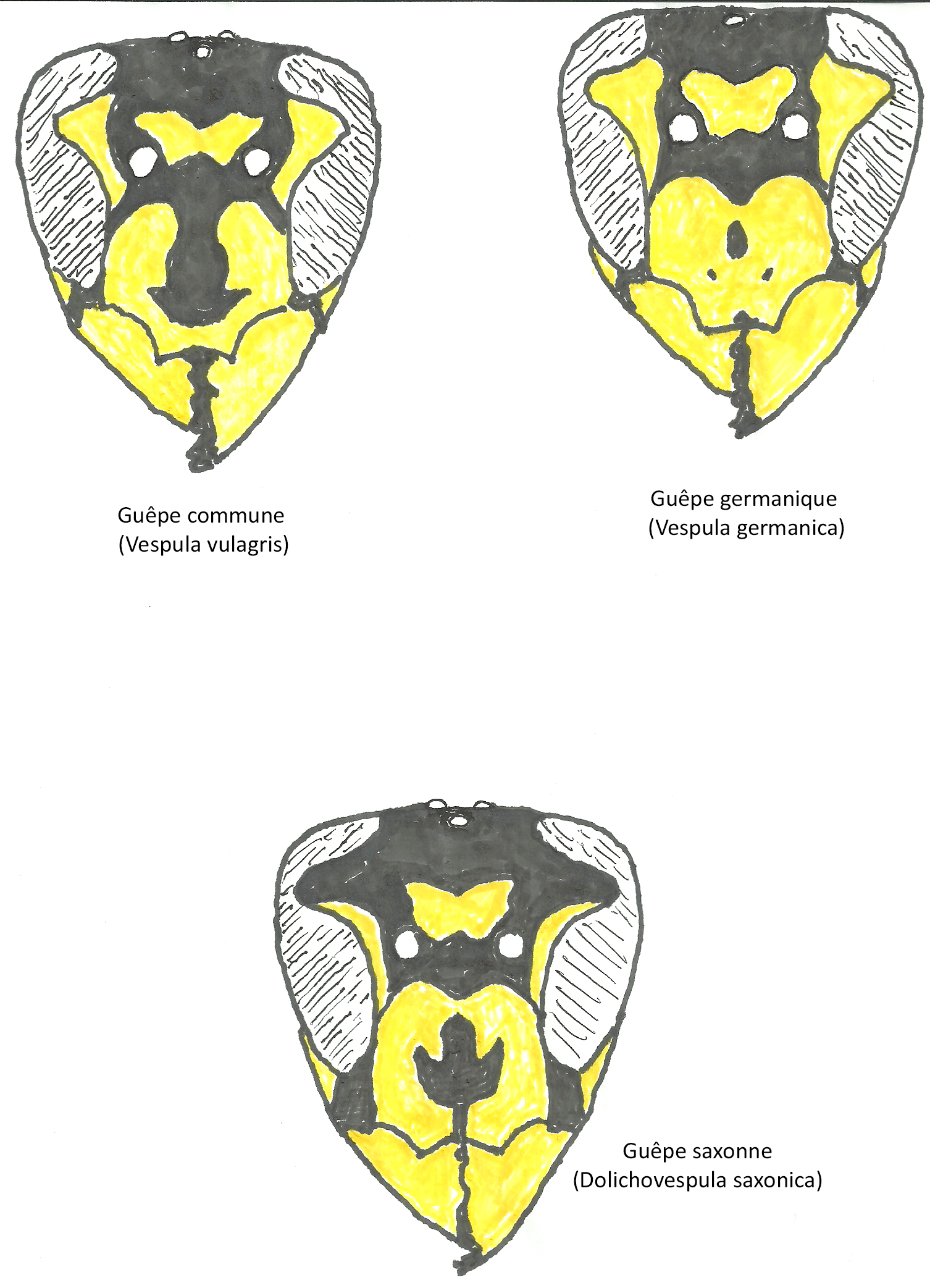 Comparaison de têtes des trois guêpes communes en Europe du Nord